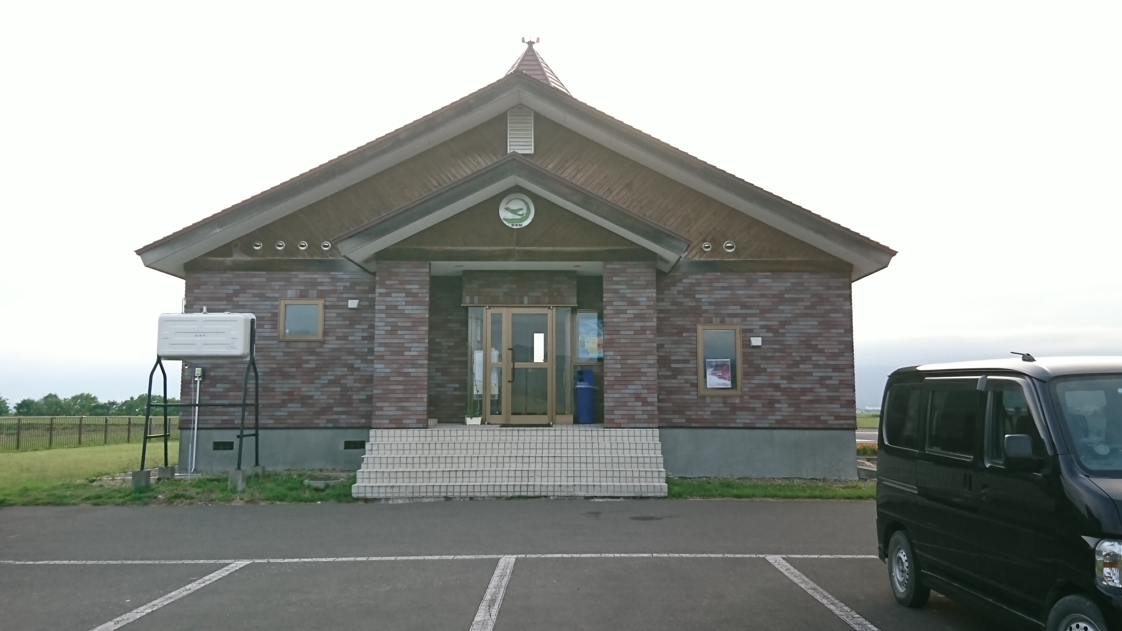 スカイポート美唄 管理棟